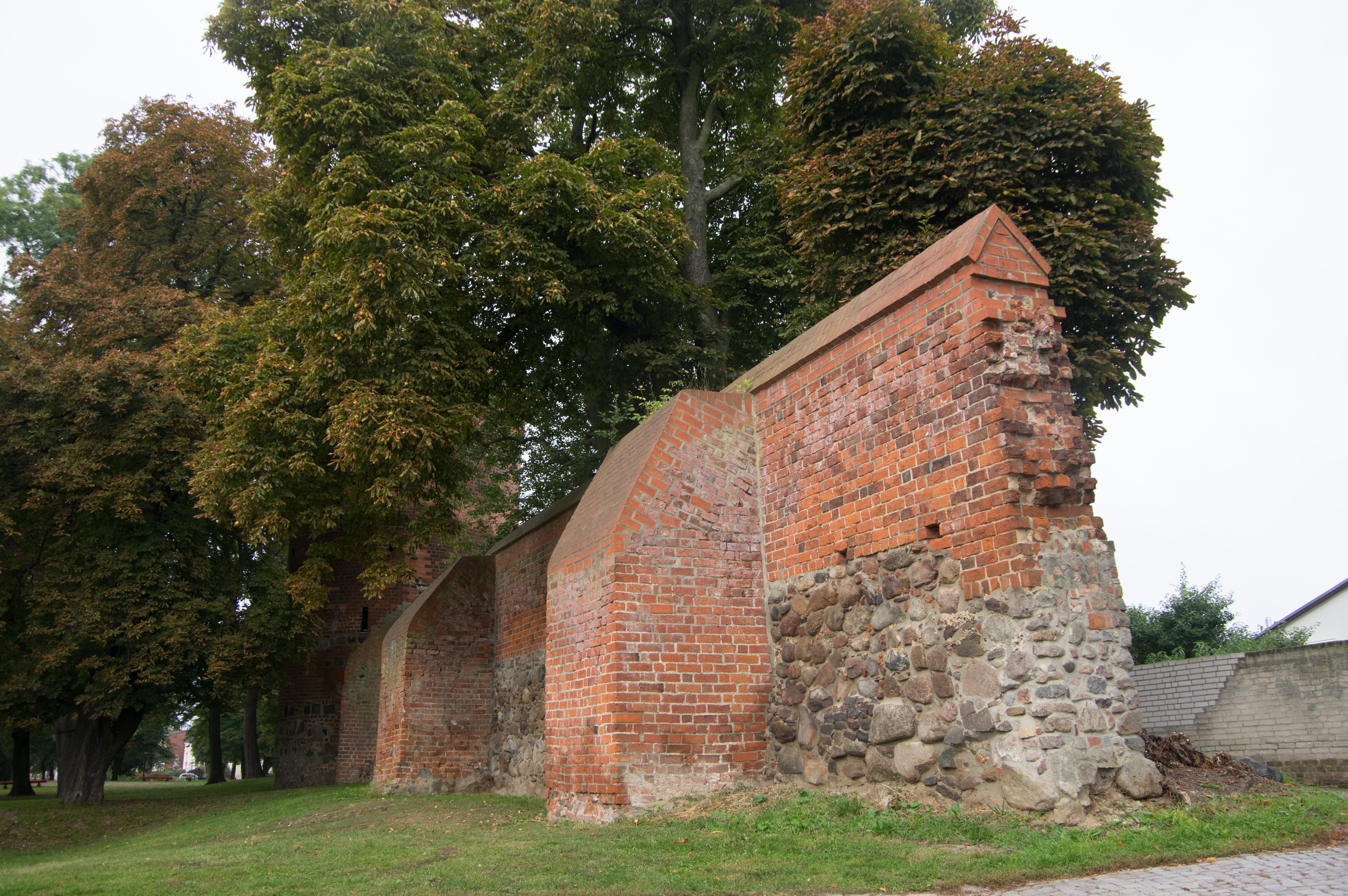 Angermünde in Brandenburg. Die Stadtbefestigung steht unter Denkmalschutz.